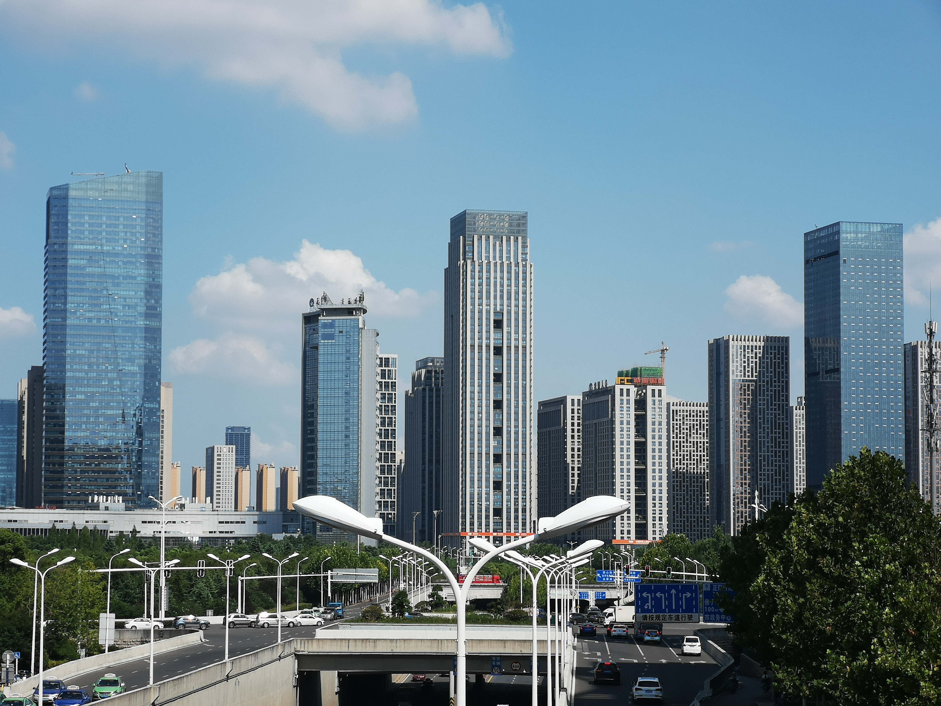 中文（中国大陆）: 合肥南二环路